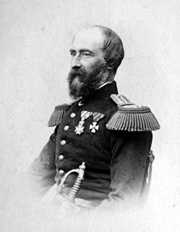 Potrait van Hasselt